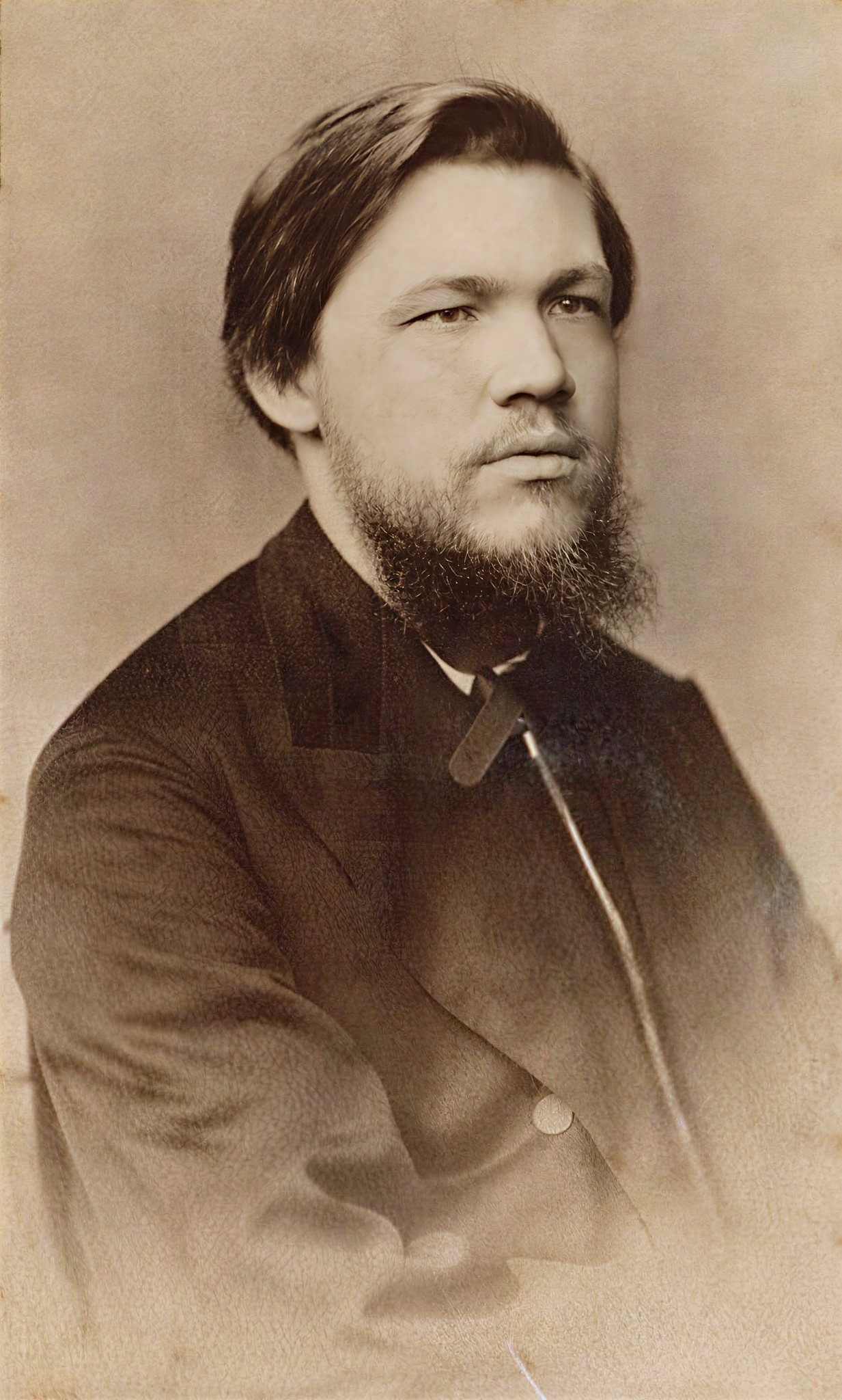 Михаил Иванович Каринский (1840-1917), конец 1860-х годов.